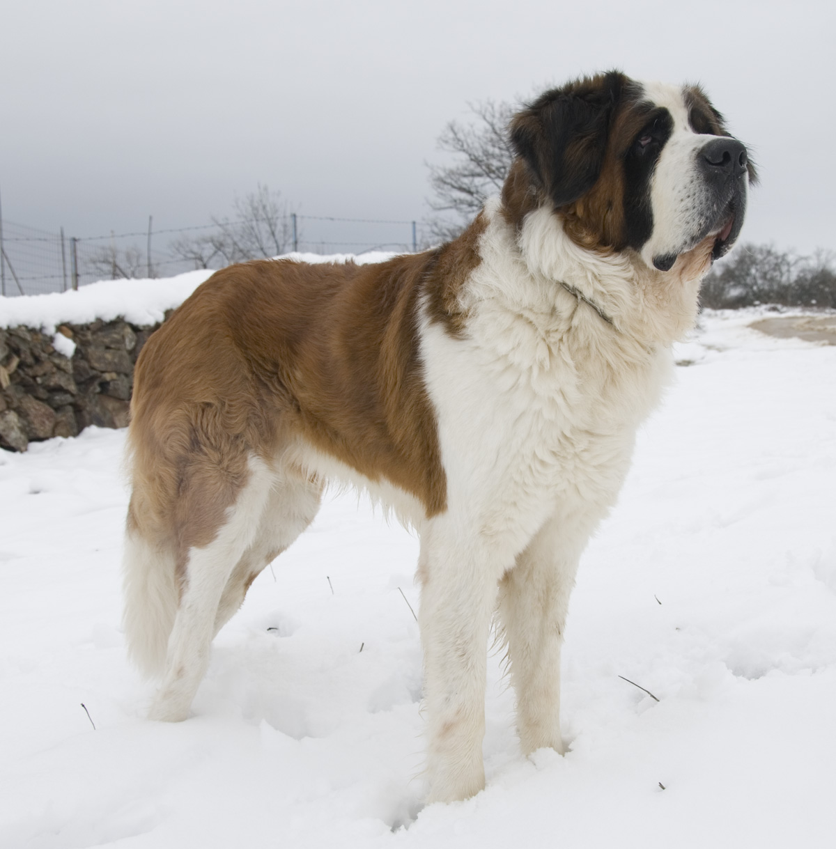 San Bernardo llamado Rey en la sierra de Madrid un día de nevada